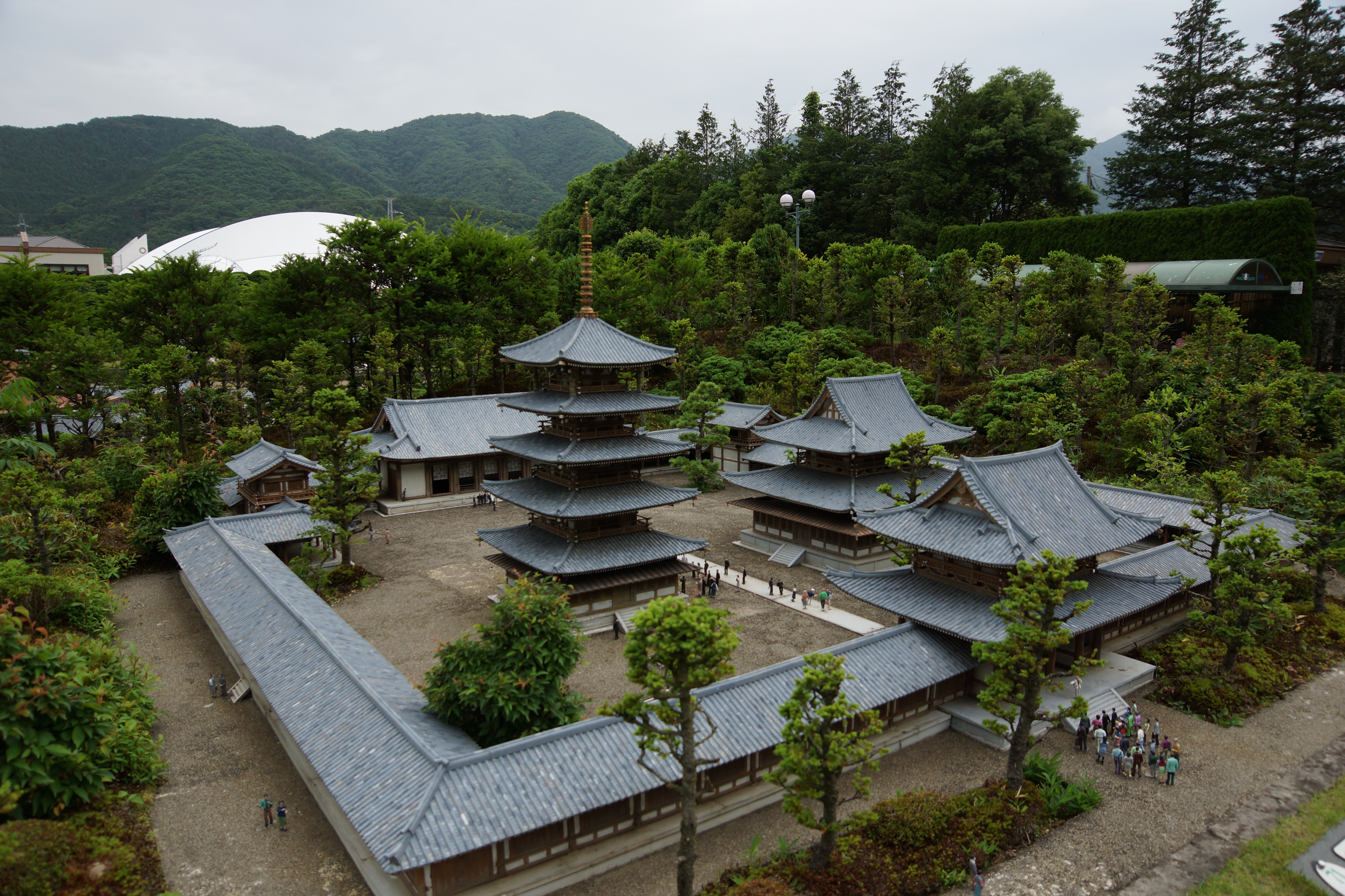 東武ワールドスクエアに展示されている法隆寺のミニチュア。